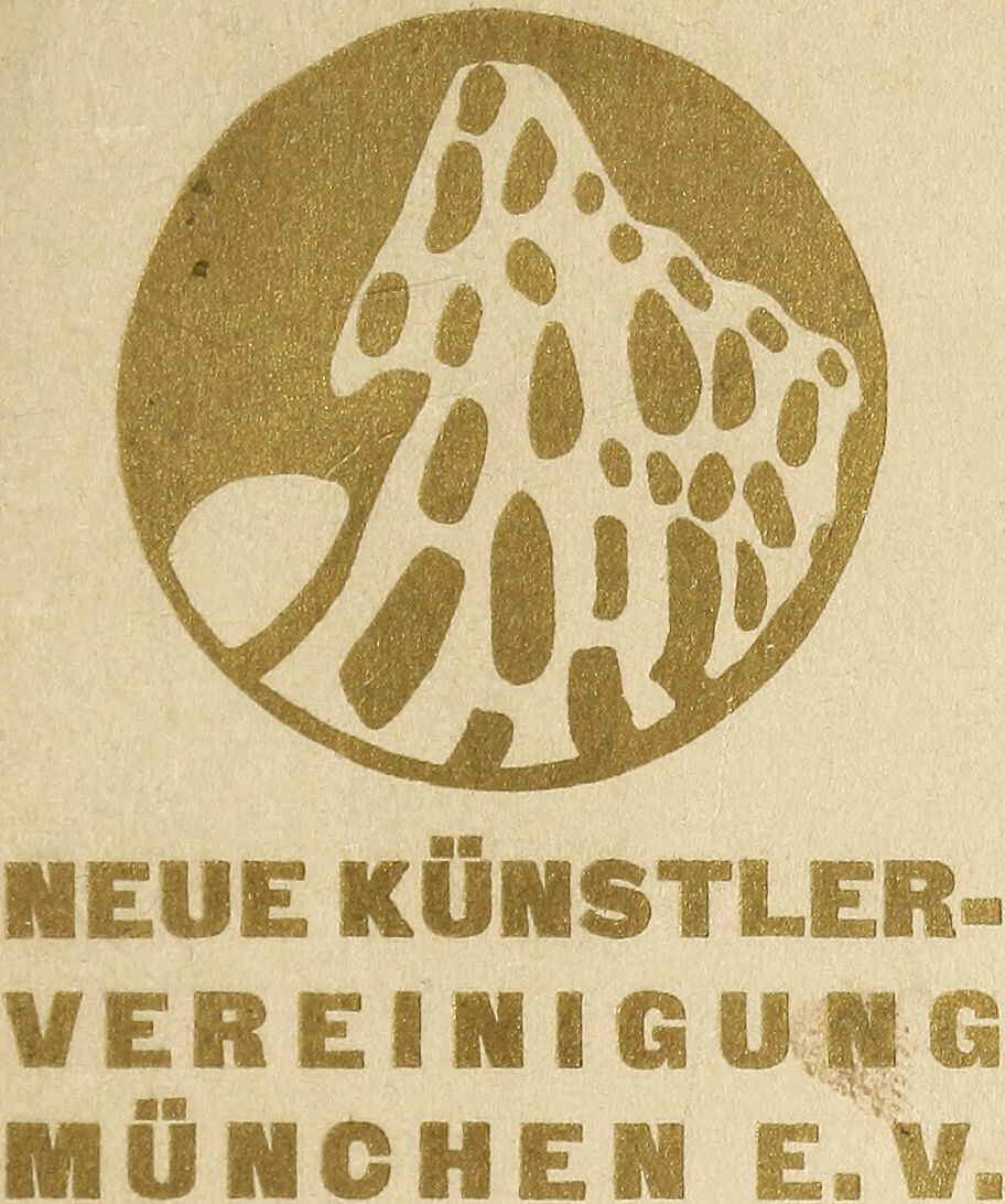 Signet der Neuen Künstlervereinigung München (N.K.V.M.) aus dem Jahre 1909